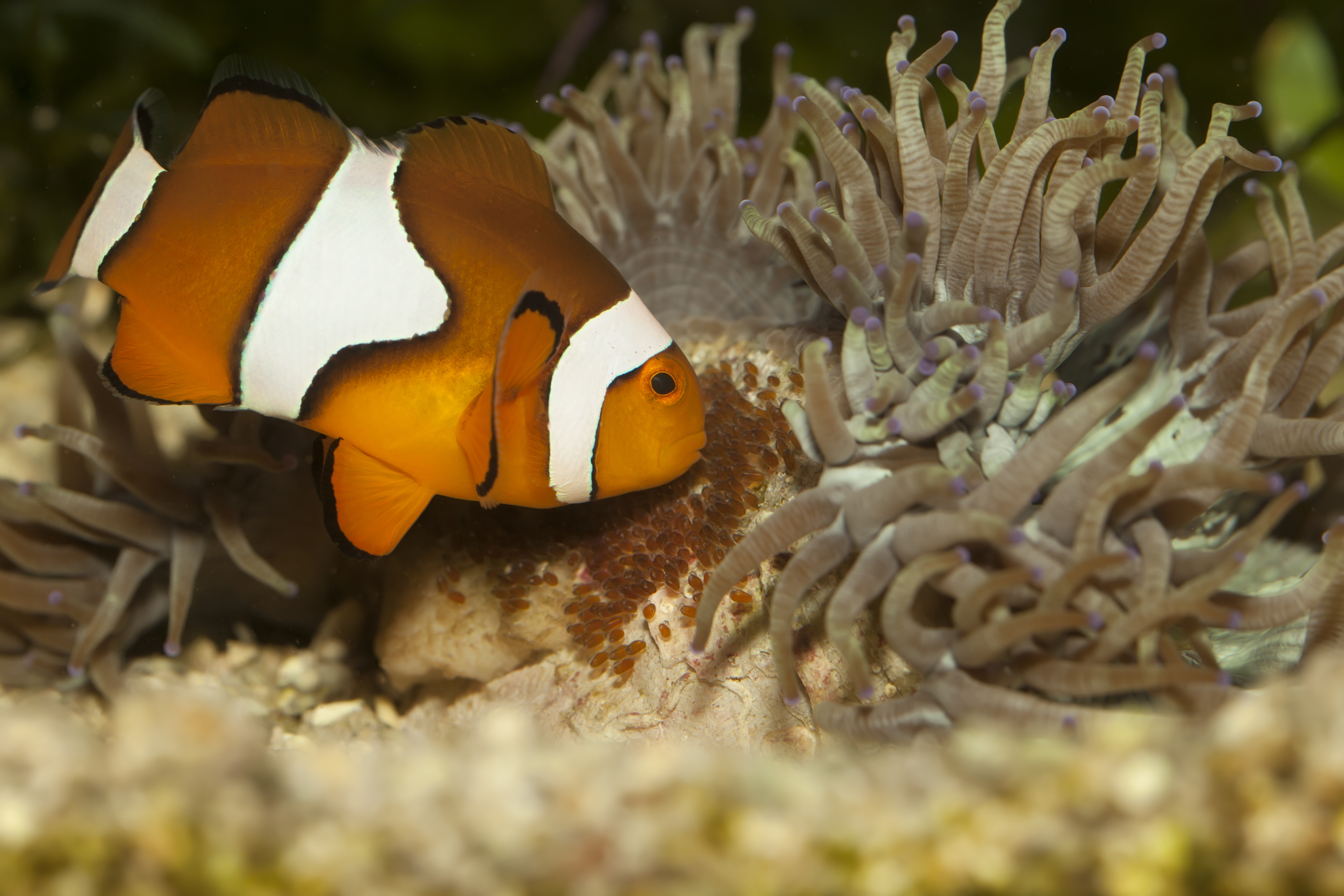 A. ocellaris macho cuidando la puesta en el esqueleto de un coral Catalaphyllia jardinei